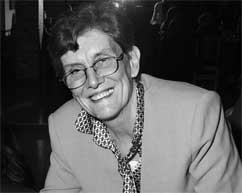 Carla Melazzini, maestra di strada e moglie di Cesare Moreno